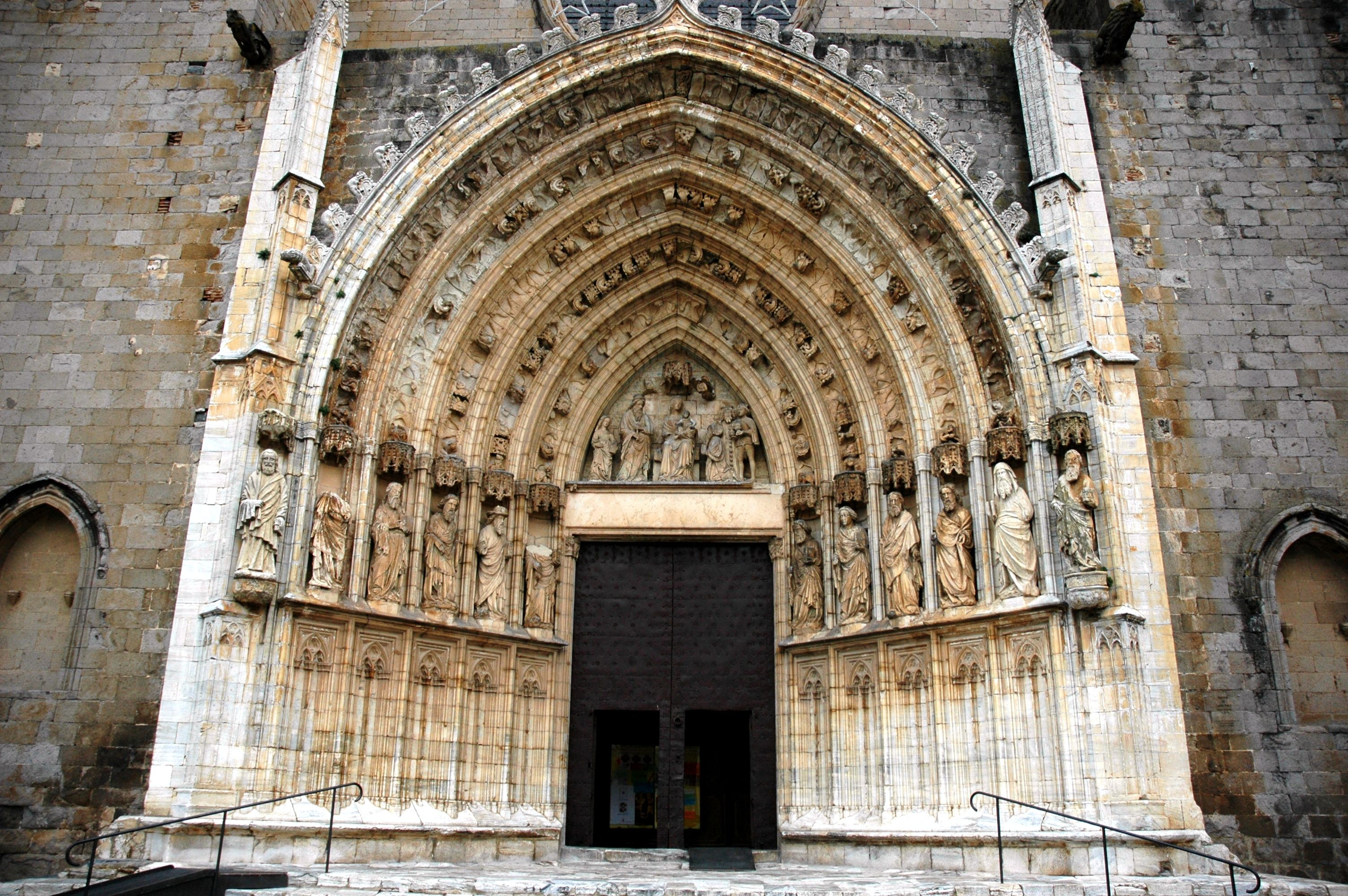 Santa Maria de Castelló d'Empúries - Portalada